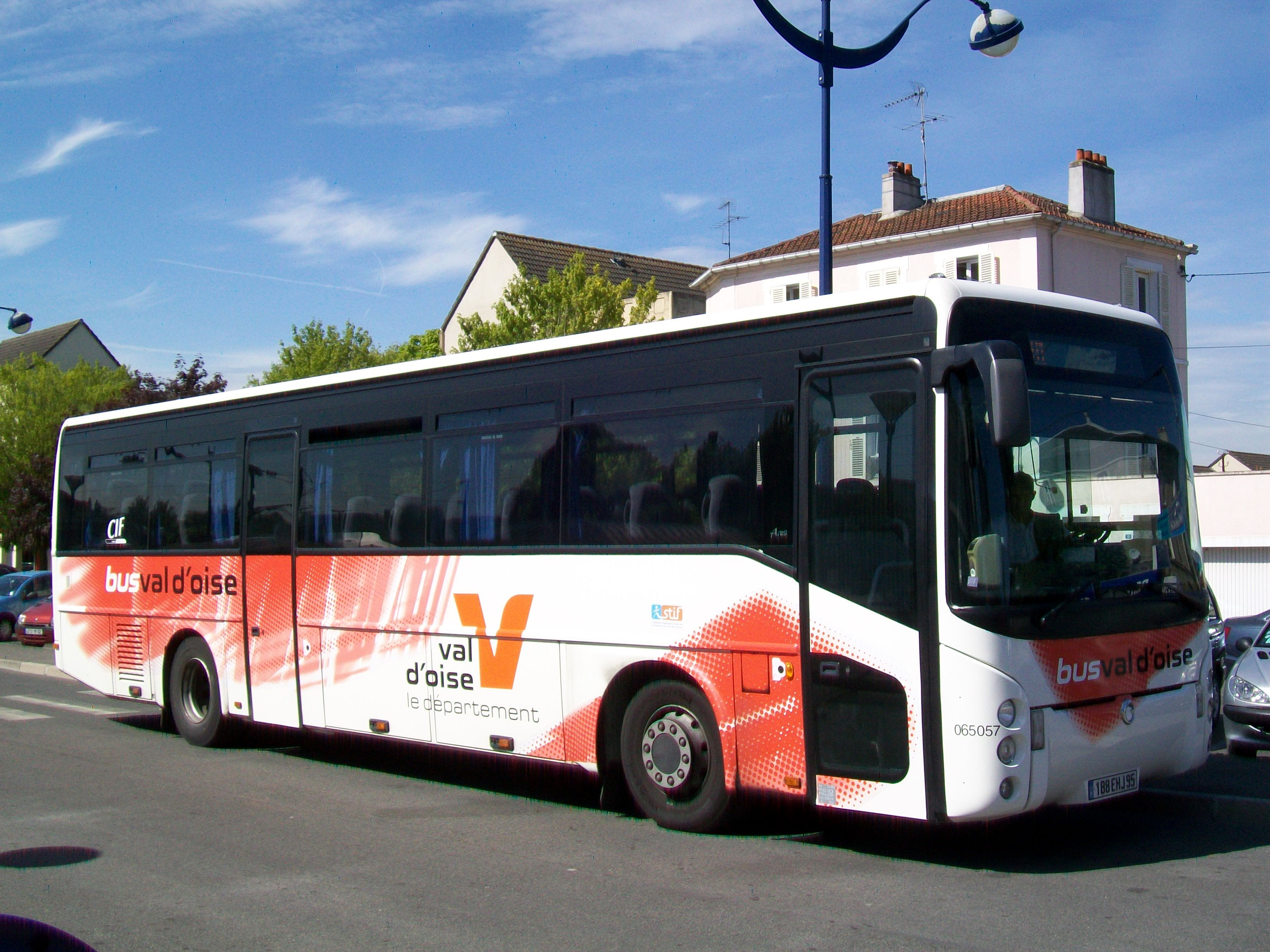 Courriers de l'Île-de-France (CIF), réseau « bus val d'oise », Irisbus Ares sur ligne 95-01 à Fosses (95), gare routière